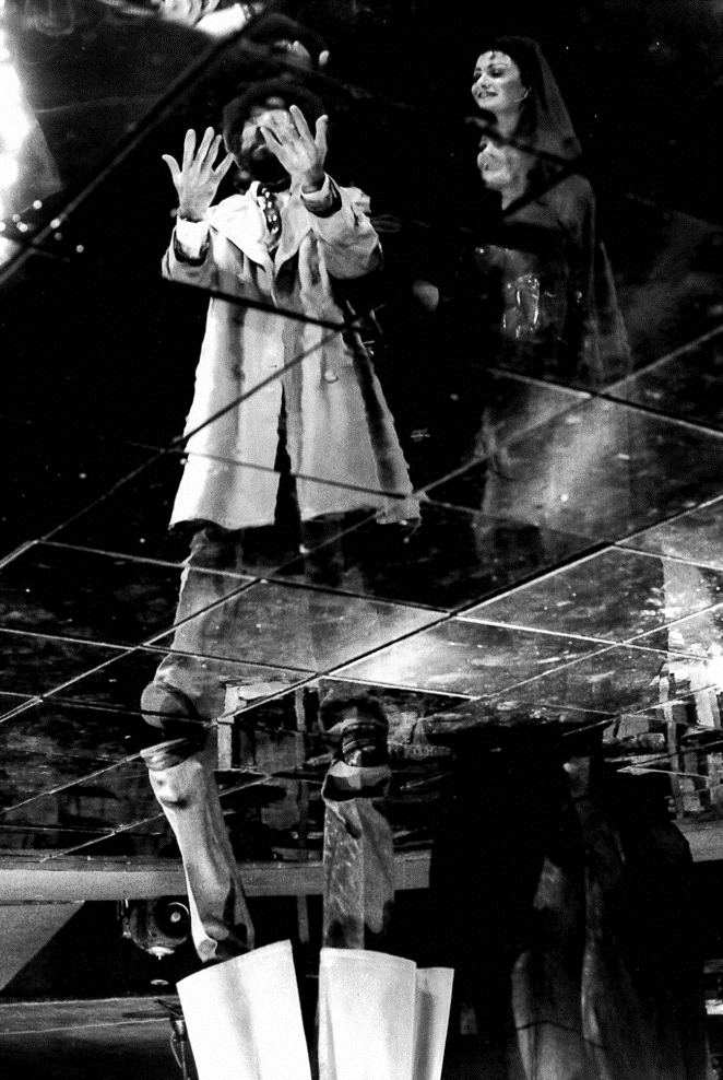 המרפסת, תיאטרון החאן, 1981